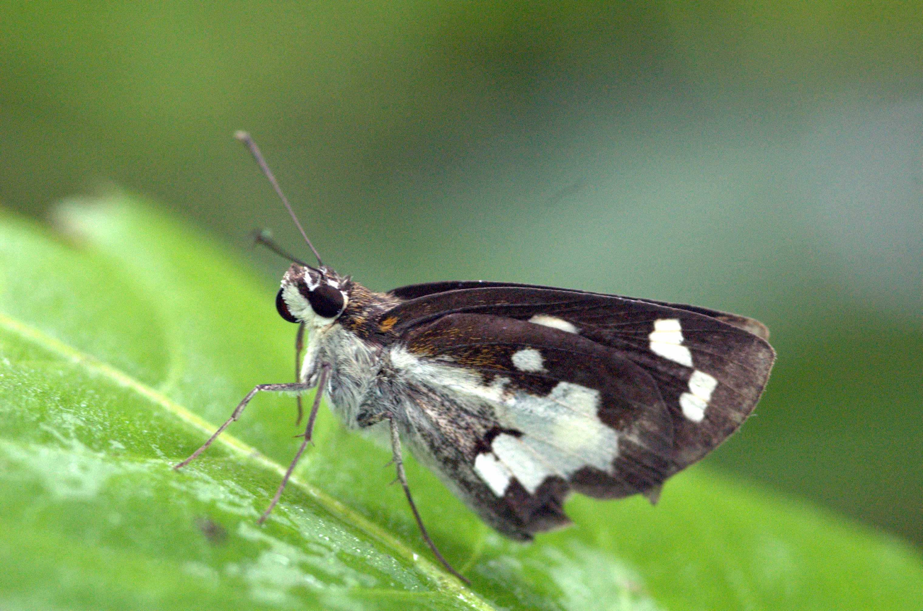 Grass Demon